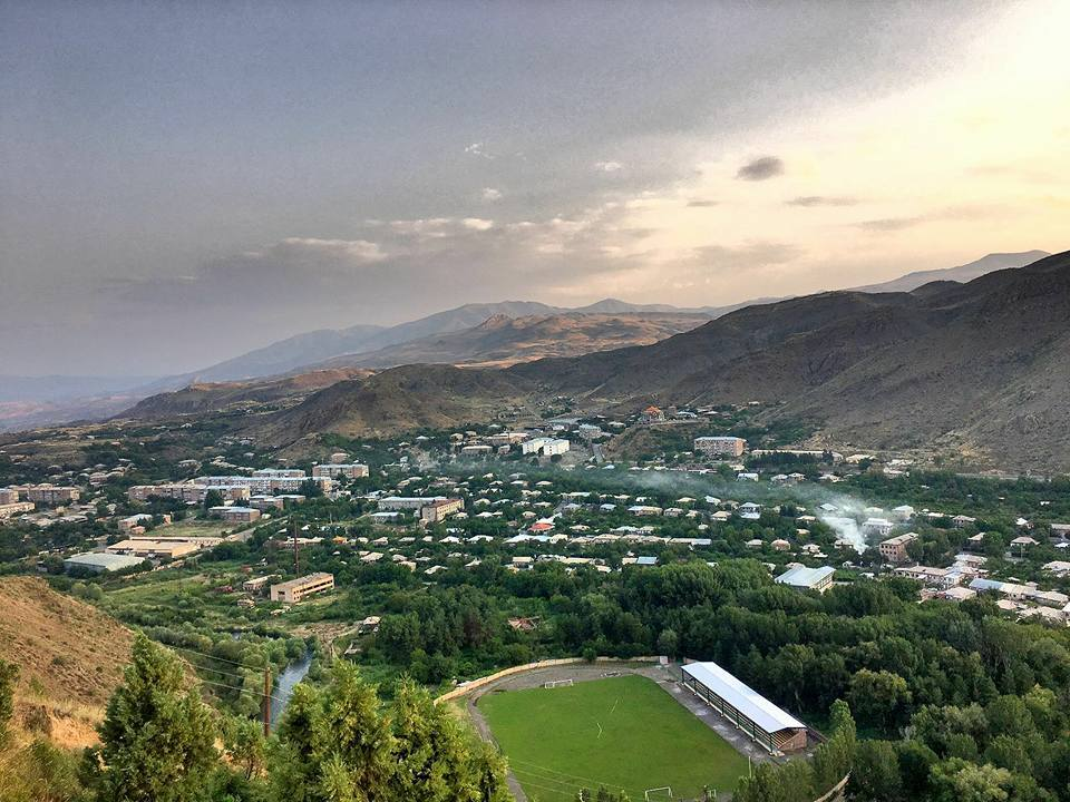 Վայք քաղաքի համայնապատկերը / Panorama of the Vayk town